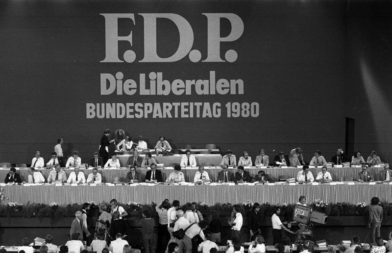 Außerordenlicher Bundesparteitag der FDP in Freiburg.